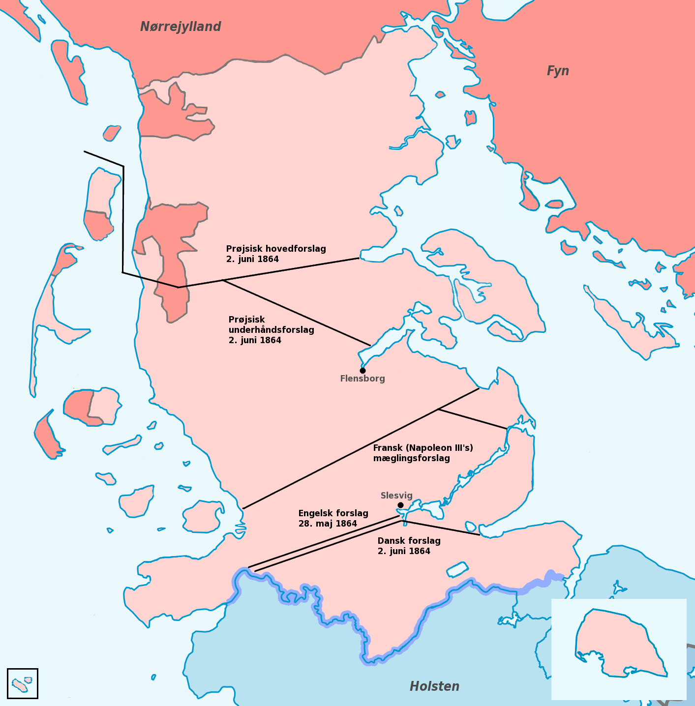 Grænseforslag på Londonkonferencen 1864